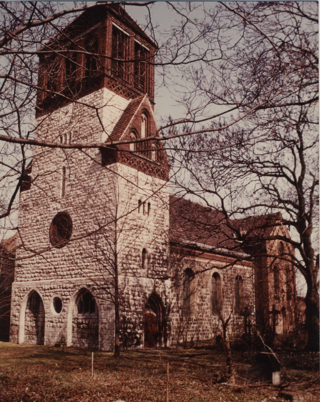 Dorfkirche Berlin-Rosenthal, im Vordergrund das neue Turmwerk aus Kalkstein (1902/03)